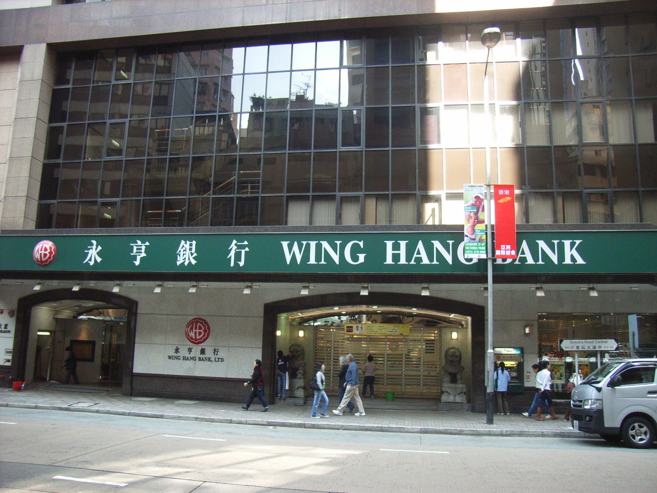 永亨銀行有限公司 (sehk/0302)是一家在zh:香港交易所上市的金融公司。主要業務是經營zh:銀行及有關之財務服務。 此公司在zh:香港註冊，地址:zh:中環zh:皇后大道中161號